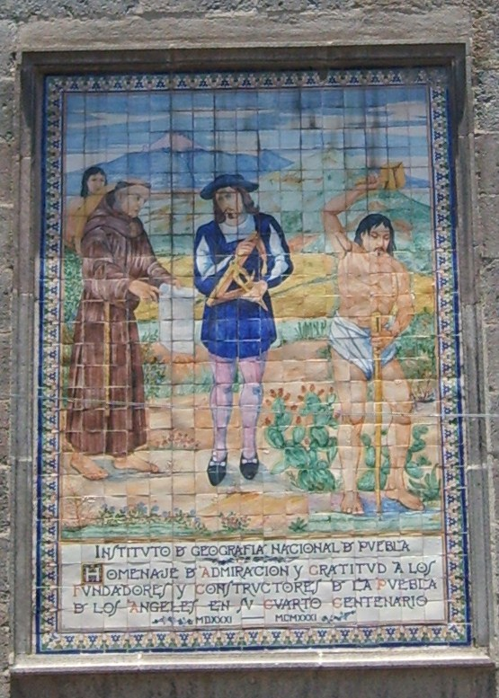 Mosaico de talavera que representa la fundación de Puebla, en la iglesia de la Santísima Trinidad